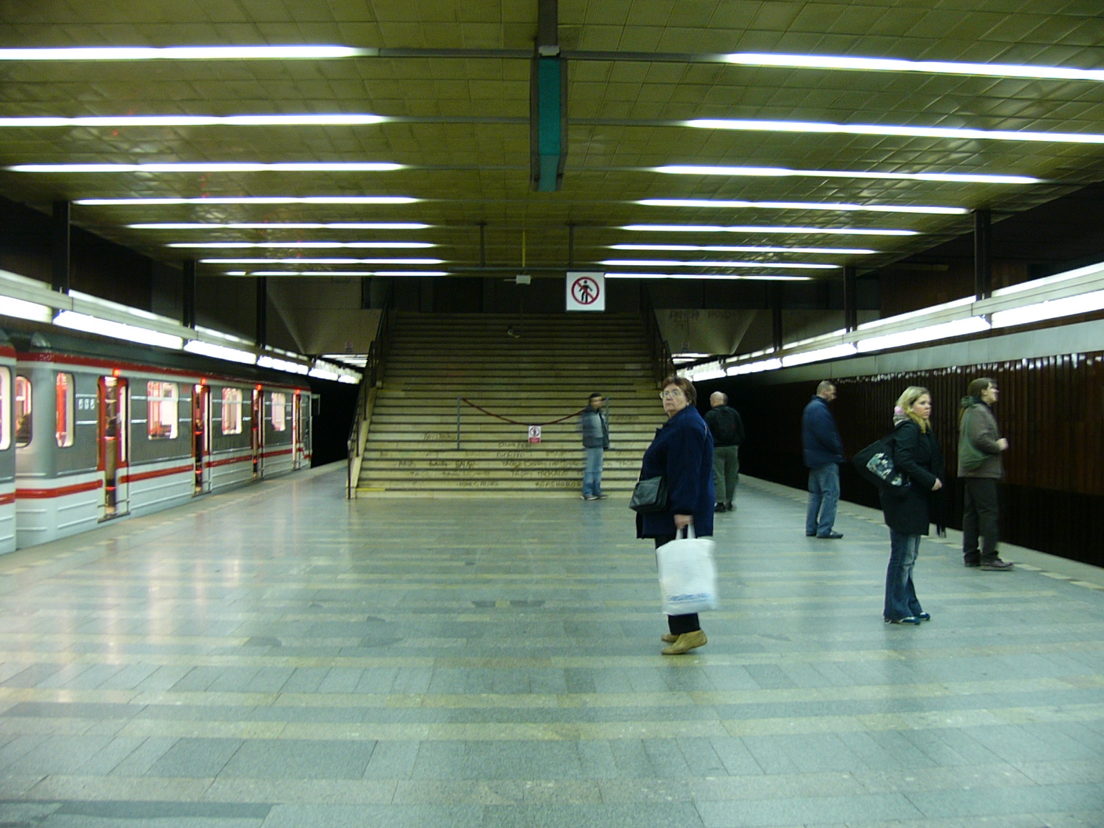 Metro station Strašnická in Prague - Stanice pražského Strašnická